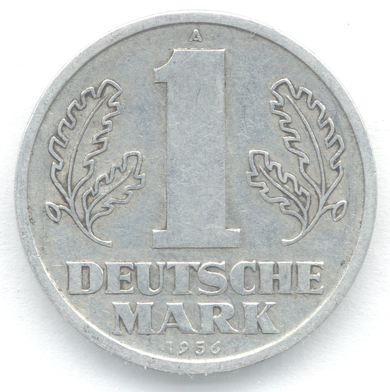 1 Deutsche Mark DDR Wertseite 1956